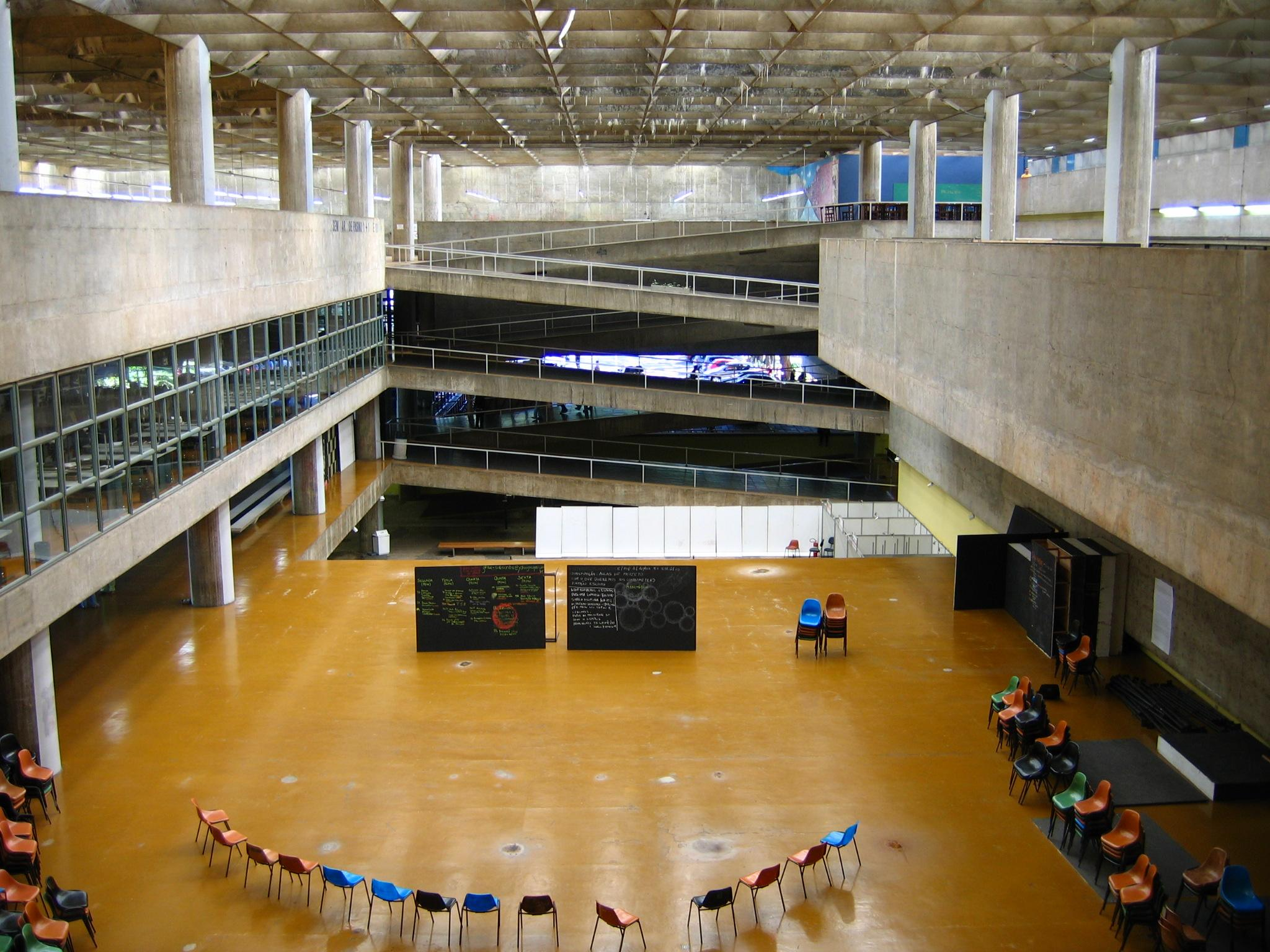 Vista do interior da Faculdade de Arquitetura e Urbanismo da USP